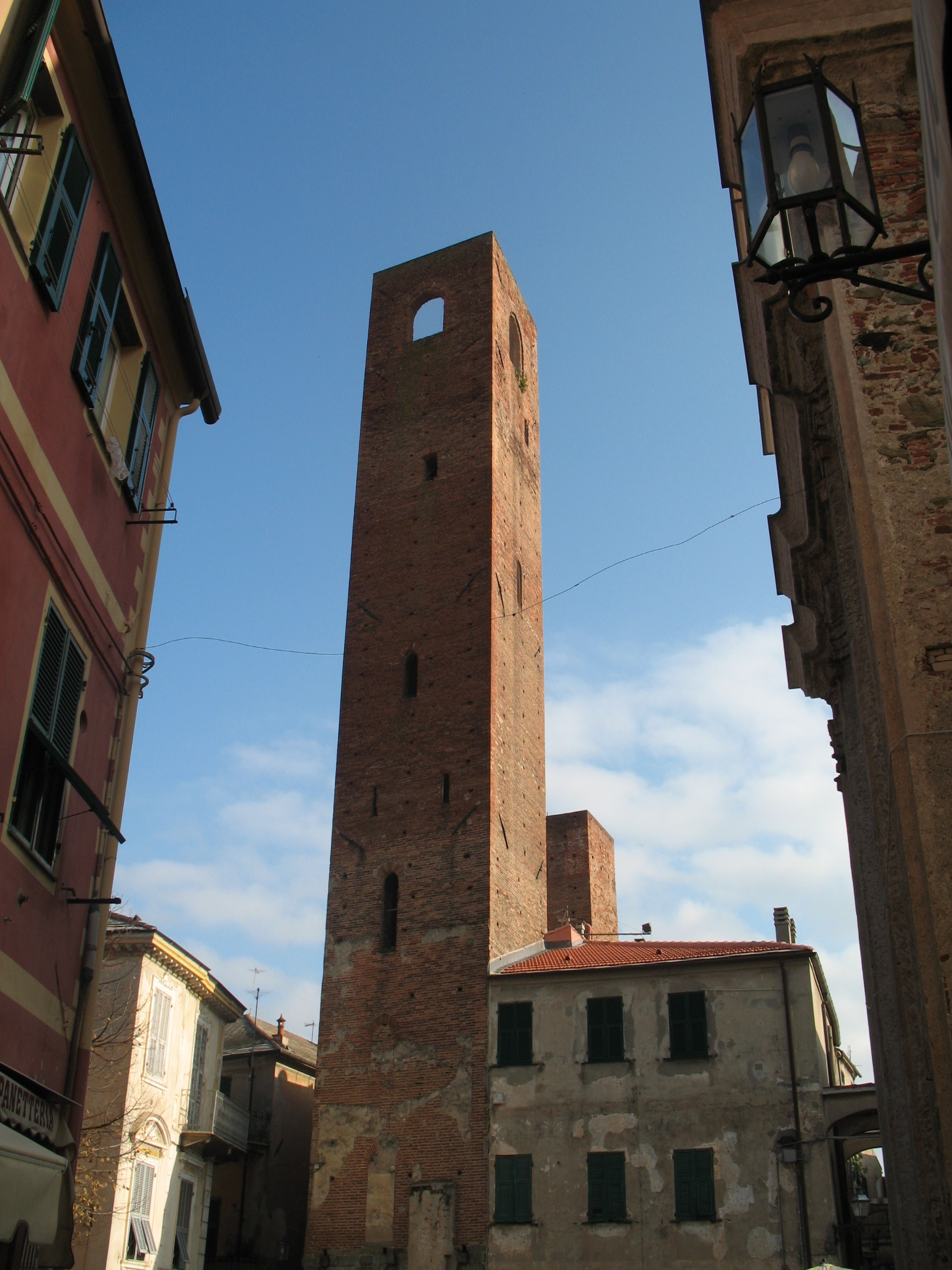 Serie di Immagini da Noli in provincia di Savona